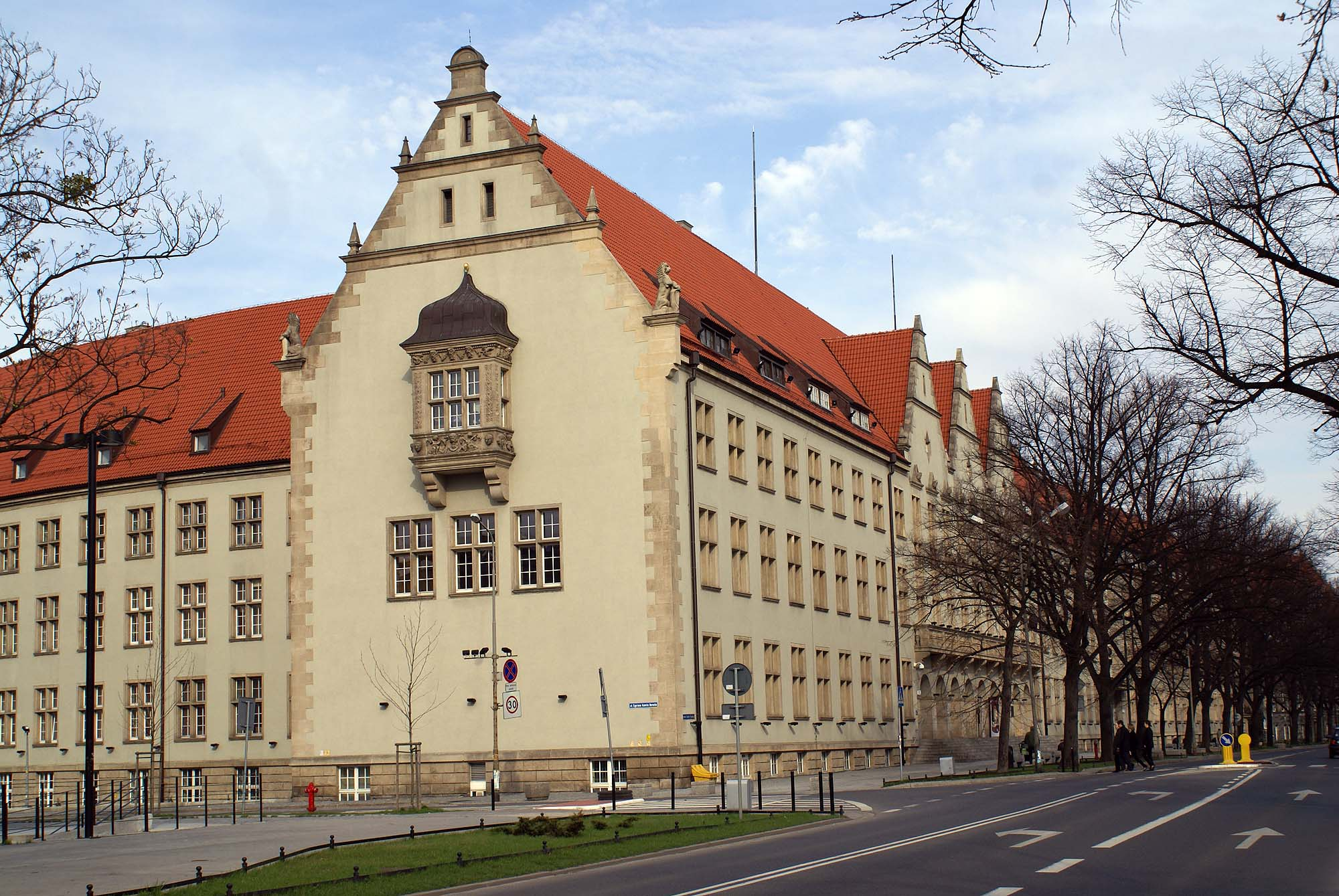 Wrocław, zespół Politechniki Wrocławskiej, 1905-1911, 1935